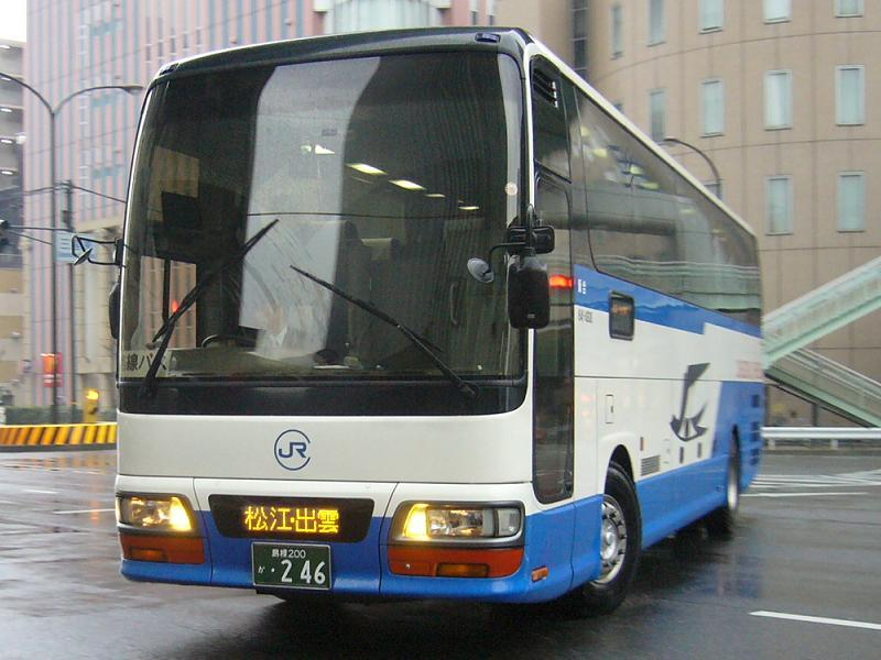 登録番号 島根200か・246 中国ジェイアールバス(Chugoku JR bus)所属 ポートレイク号用 いすゞ・ガーラ KL-LV781R2